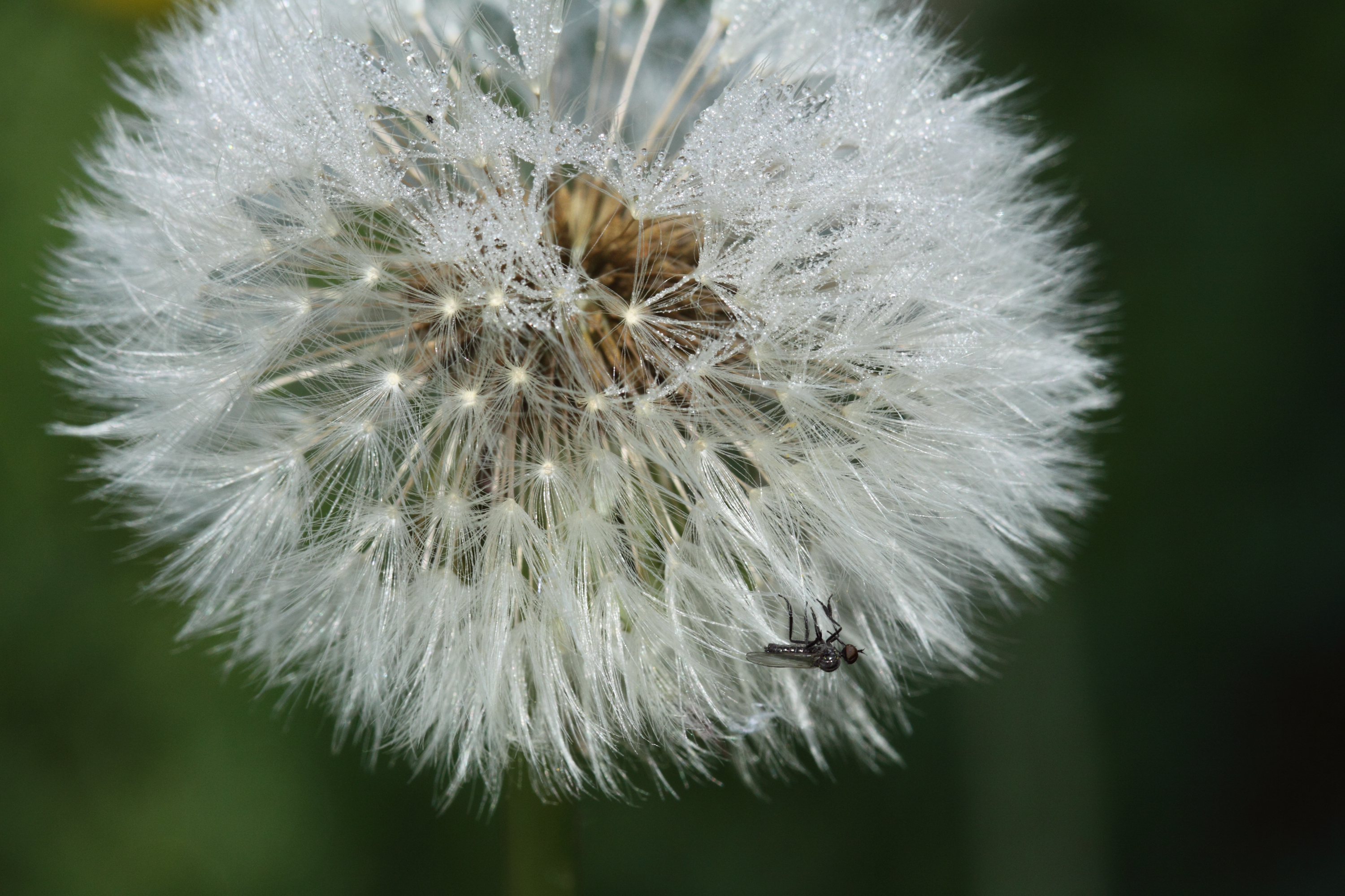 Detailaufnahme einer reifen Löwenzahnpflanze ("Pusteblume")